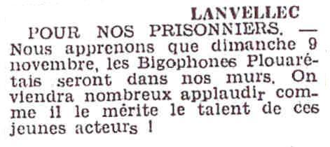 Annonce concernant les bigophones de Plouaret.